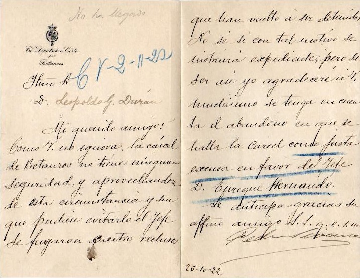 Carta firmada en 1922 por Pedro Seoane Varela, Diputado a las Cortes por Betanzos